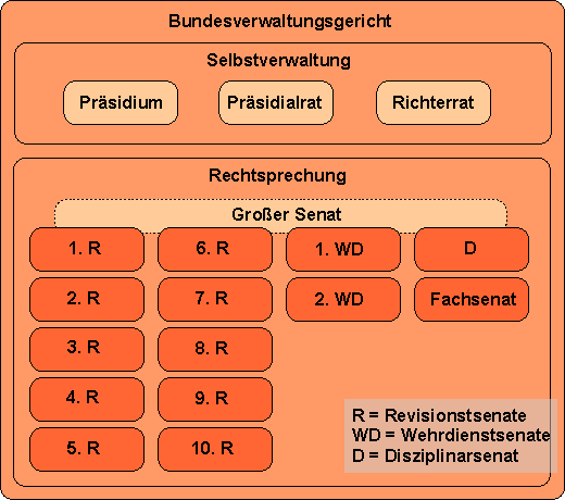 Interne Gerichtsorganisation des Bundesverwaltungsgerichts Autor: C.Löser Erstellt mit: de: Draw